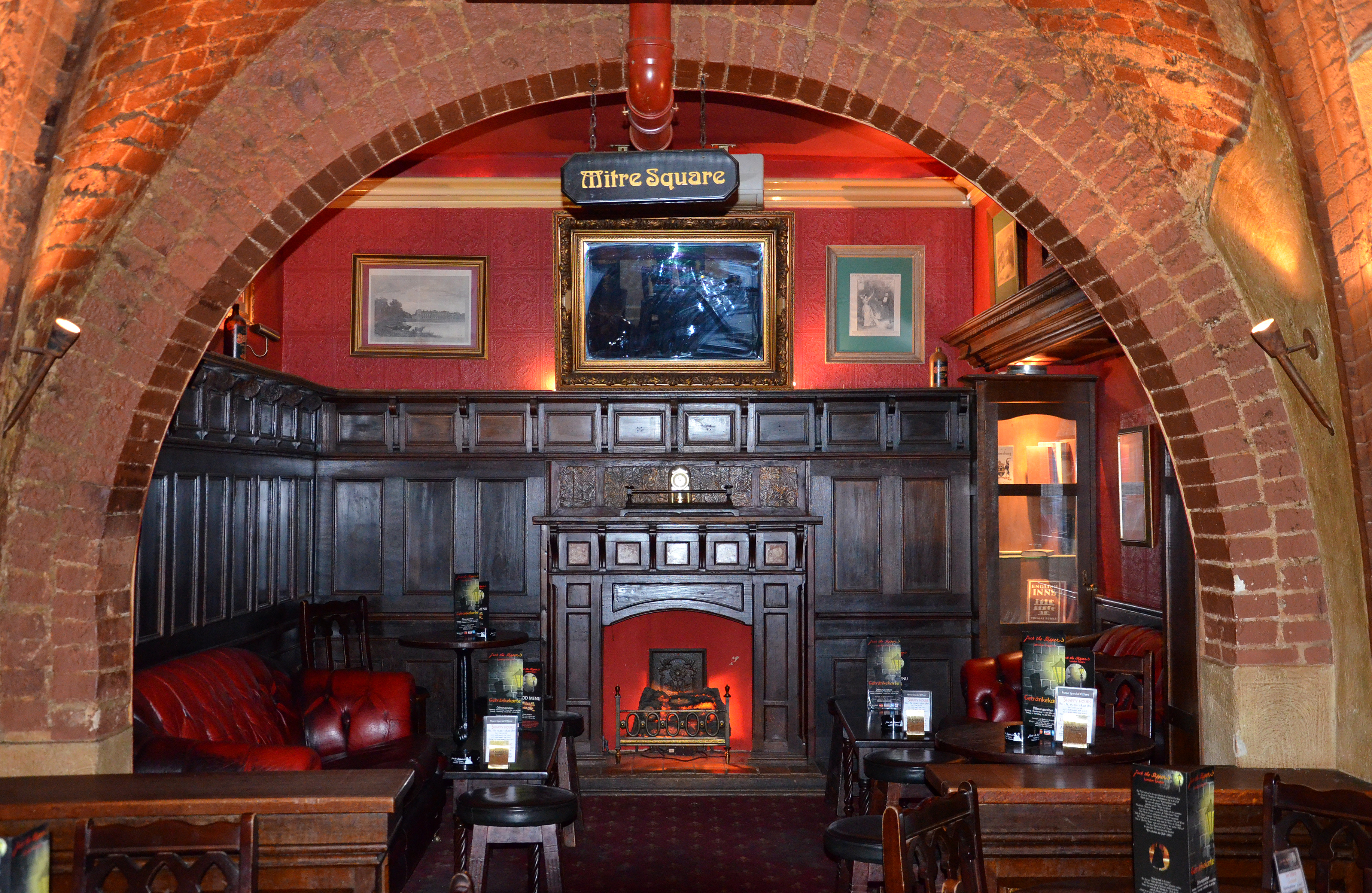 Das durch Schwungtüren abgetrennte „Kamin-“ und Raucherzimmer „Mitre Square“ ...